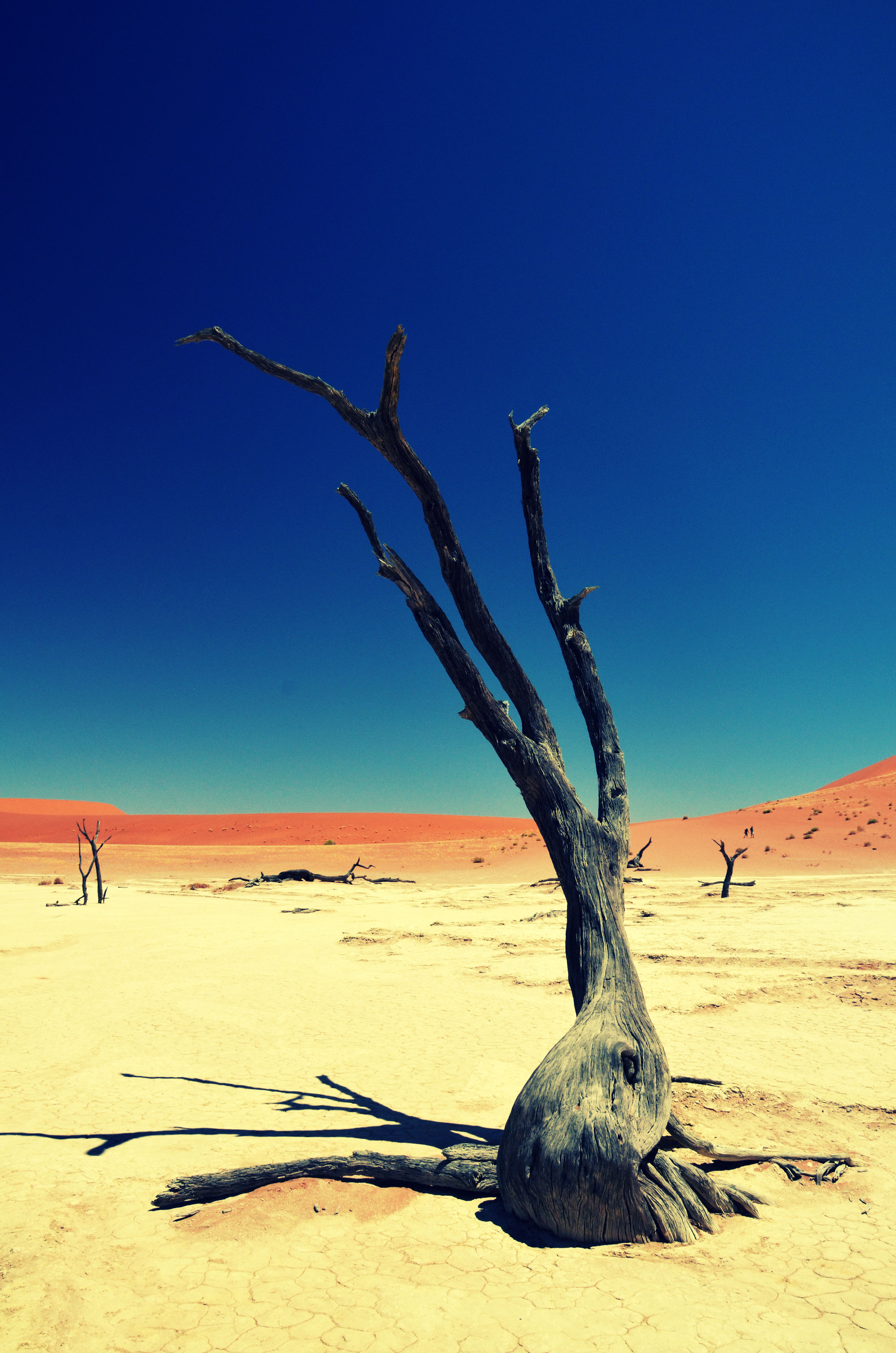 Toter Baum im Deadlvei